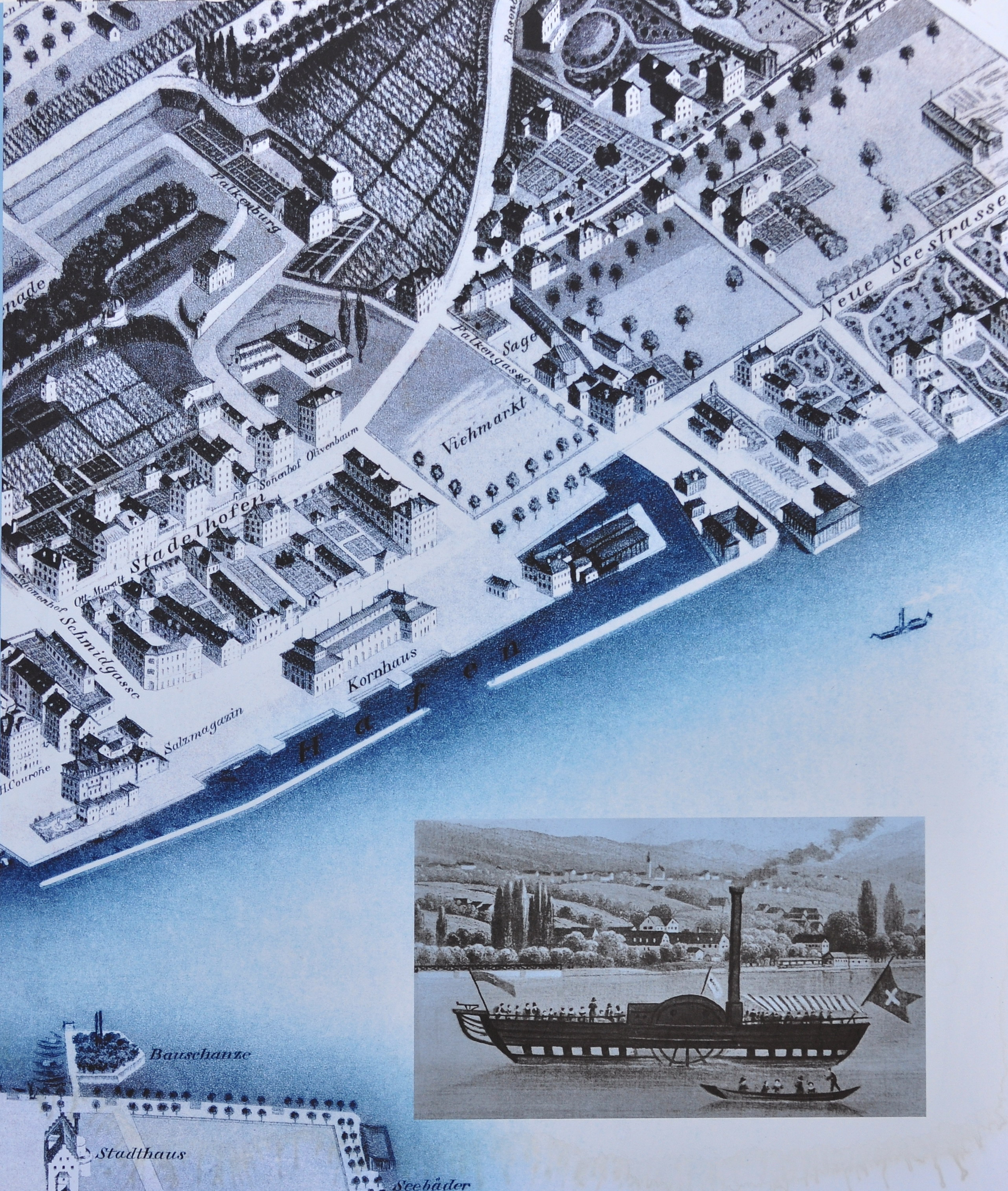 Das Gelände zwischen dem heutigen Bellevue, beim einstigen Salzmagazin, und dem heutigen Stadelhoferplatz, dem ehemaligen Viehmarkt, mit dem 'neuen' Hafen und dem Kornhaus um 1846. Links unten sind das Bauschänzli und das alte Stadthaus beim heutigen Bürkliplatz zu erkennen.Fotografiert von den Schautafeln der Archäologischen Grabung Parkhaus Opéra in Zürich (Schweiz); die Beschreibungen sind den entsprechenden Abbildungen im Wortsinn entnommen.